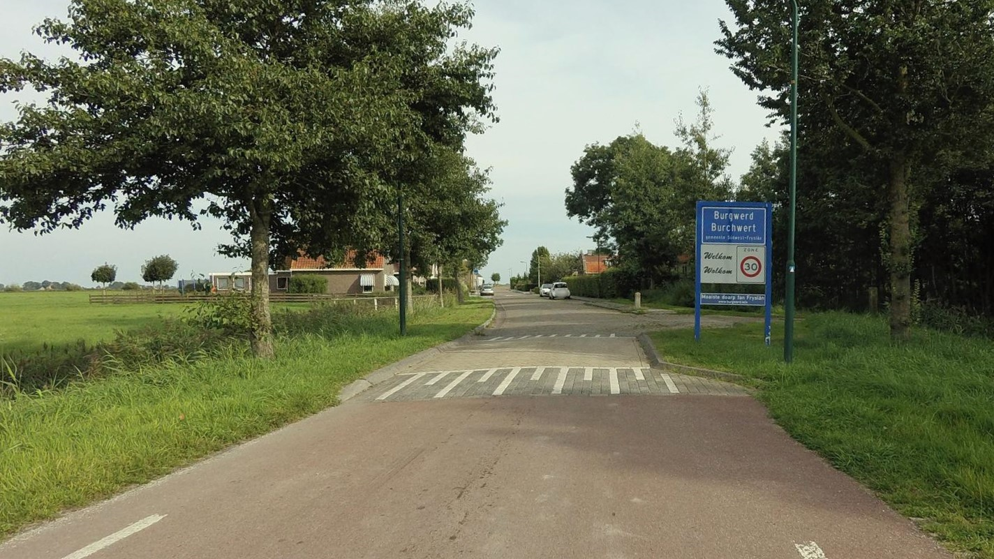 Burgwerd